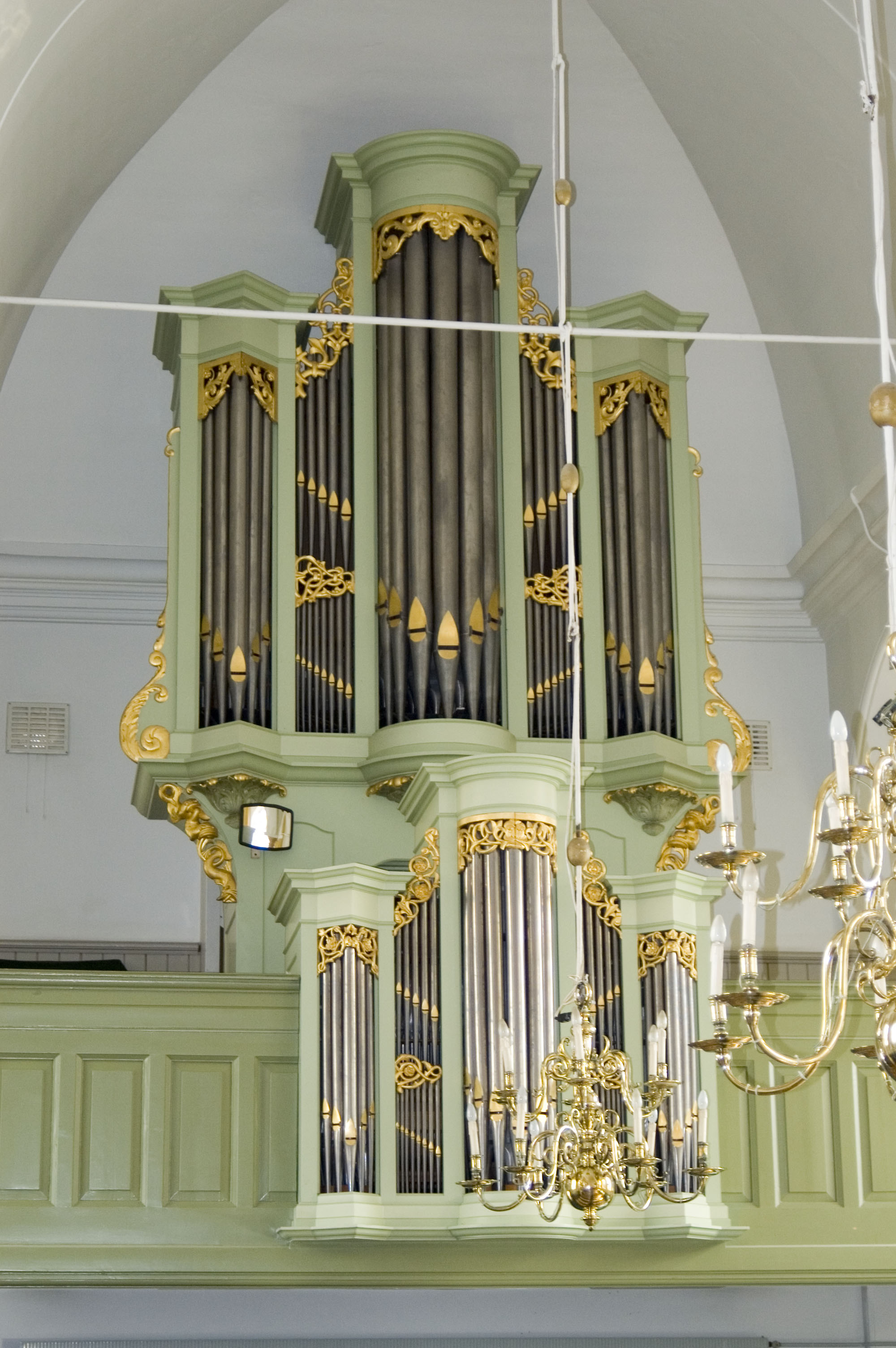 Orgel in de Grote Kerk, Marken, in 1972 gebouwd door de firma Gebroeders Van Vulpen